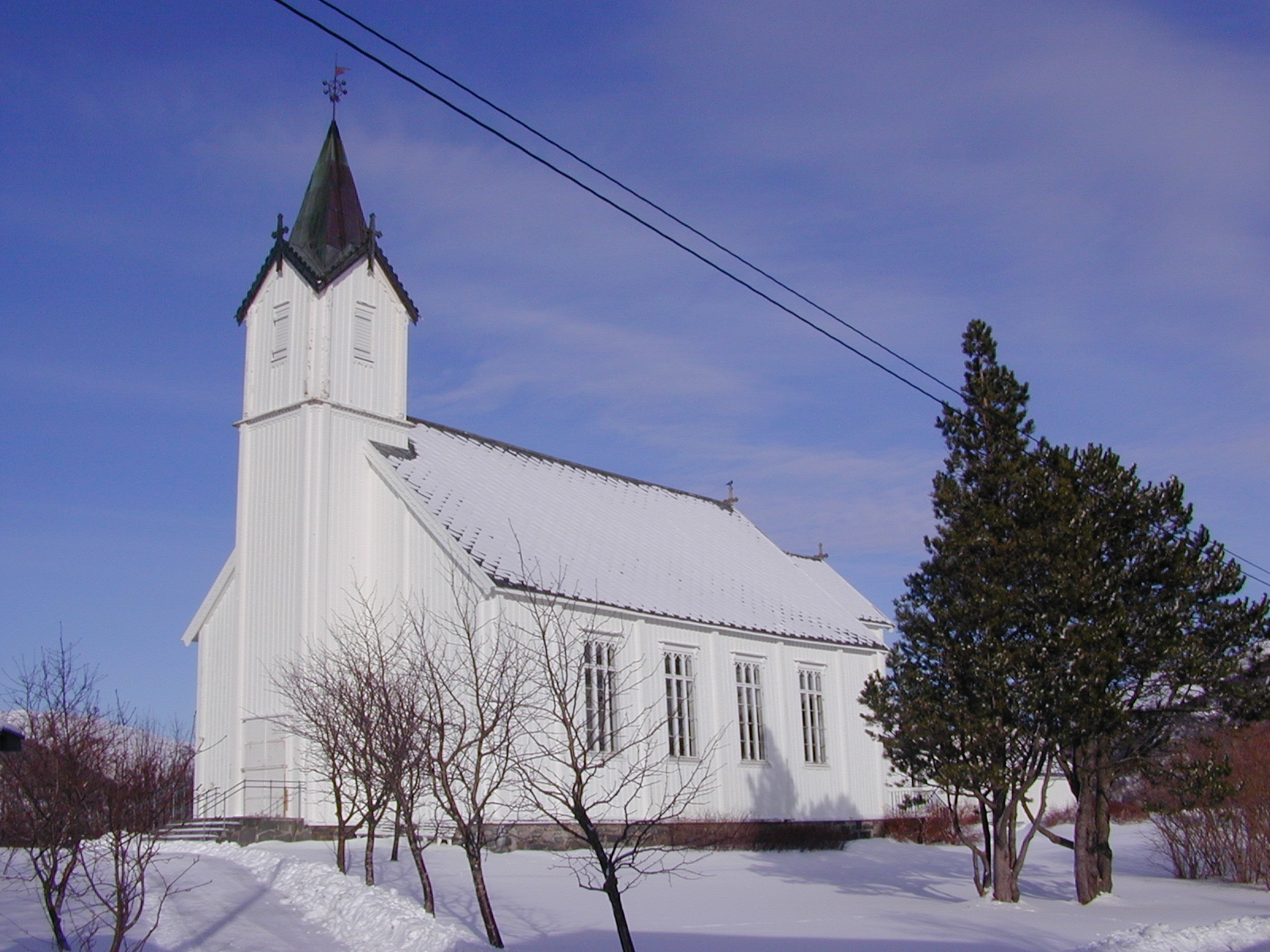 From Osen, Sør-Trøndelag, Norway. Osen kirke